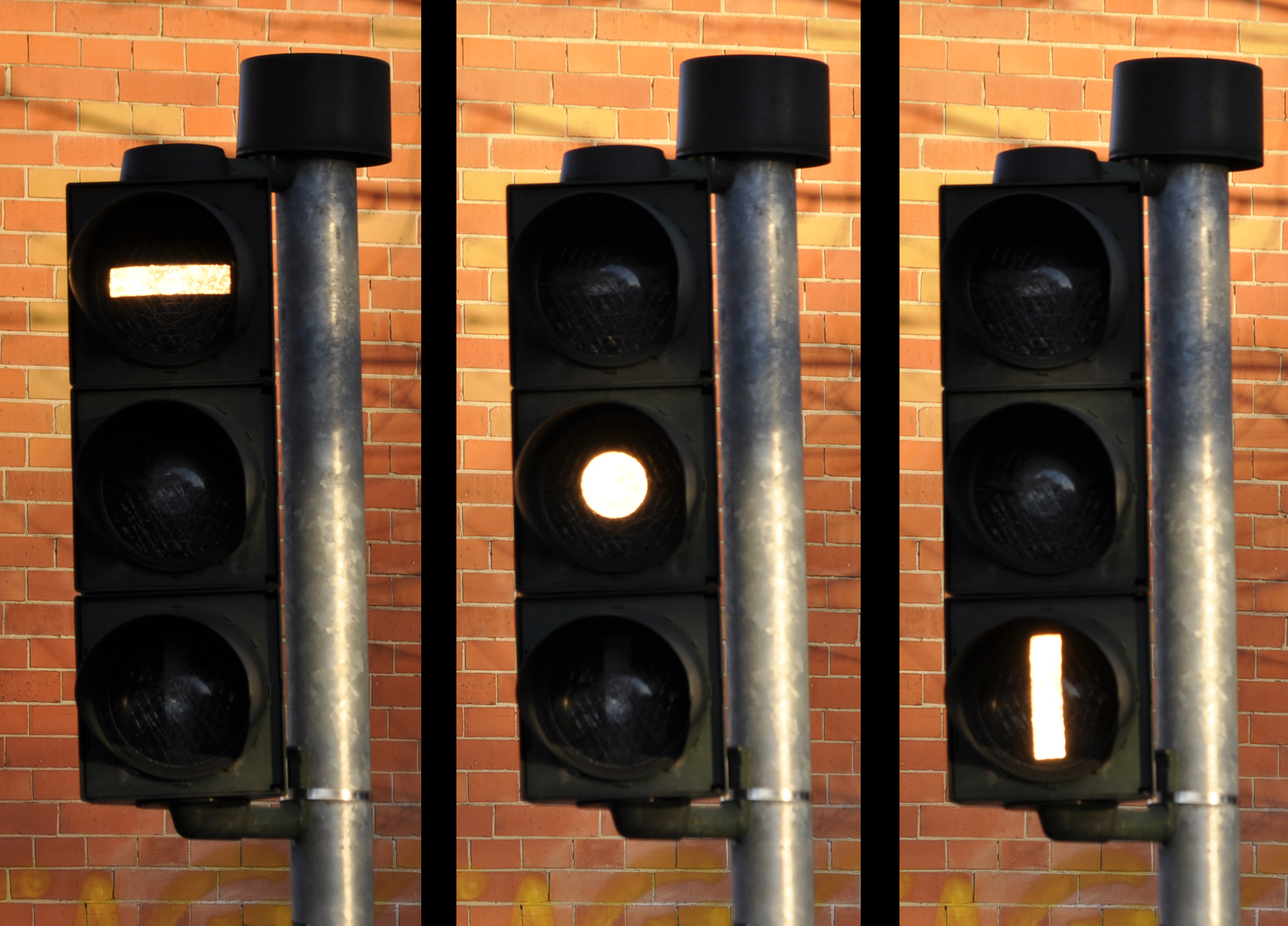 Busampel, Göttingen, Kreuzbergring/Blauer Turm, 5.1.2014. Foto: Francisco Welter-Schultes.